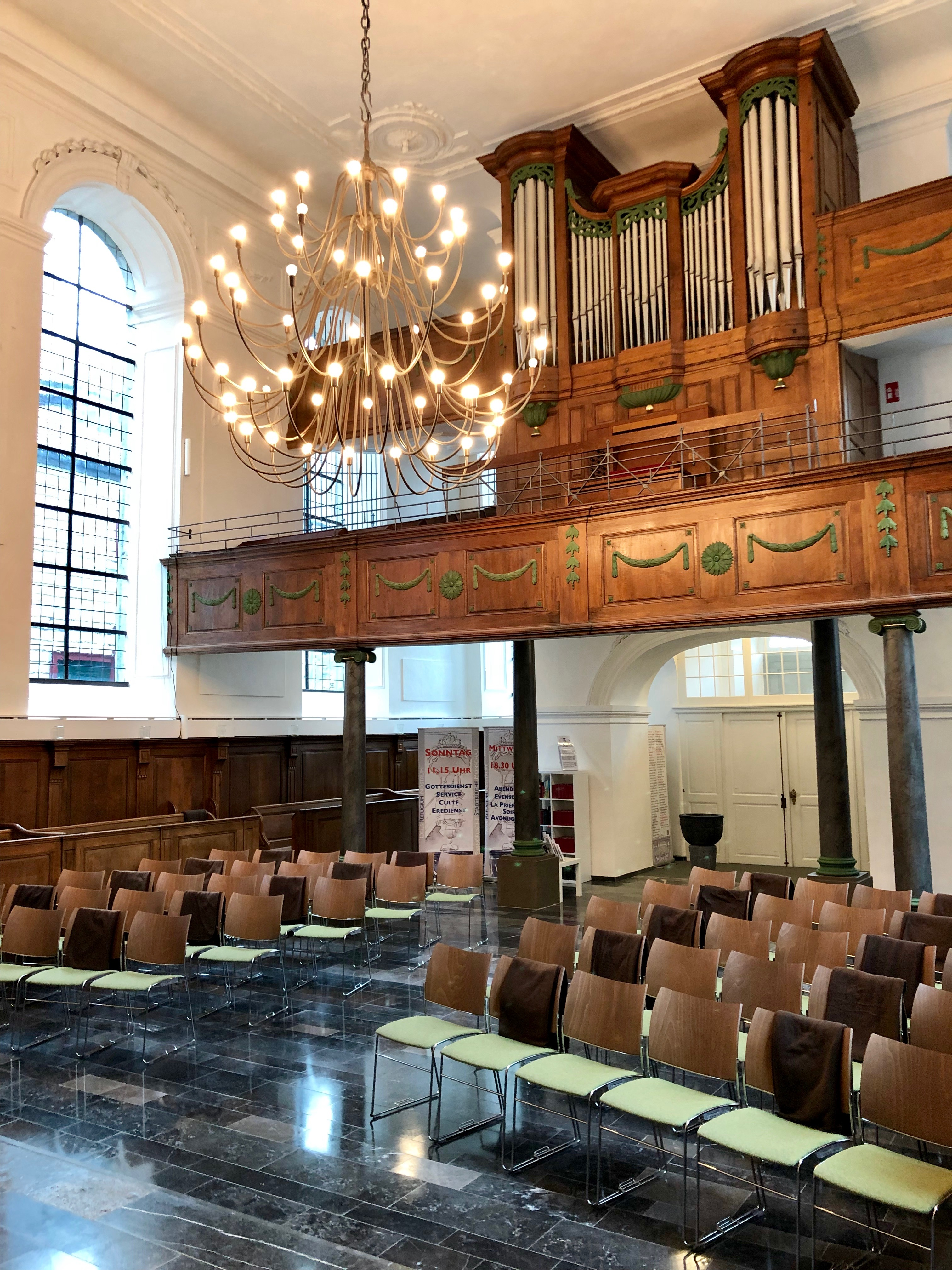 Kircheninnenraum mit Blick auf die Orgel, Zustand Januar 2019